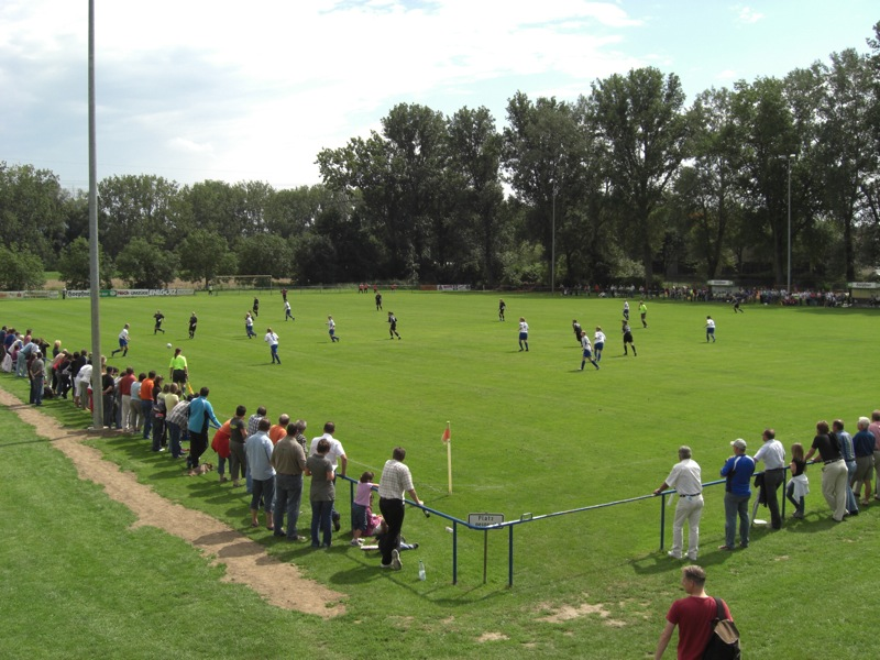 Frauenmannschaft des ASV Hagsfeld beim Spiel in der 2. Bundesliga Süd gegen SC Regensburg am 19. August 2007, Ergebnis 2:0